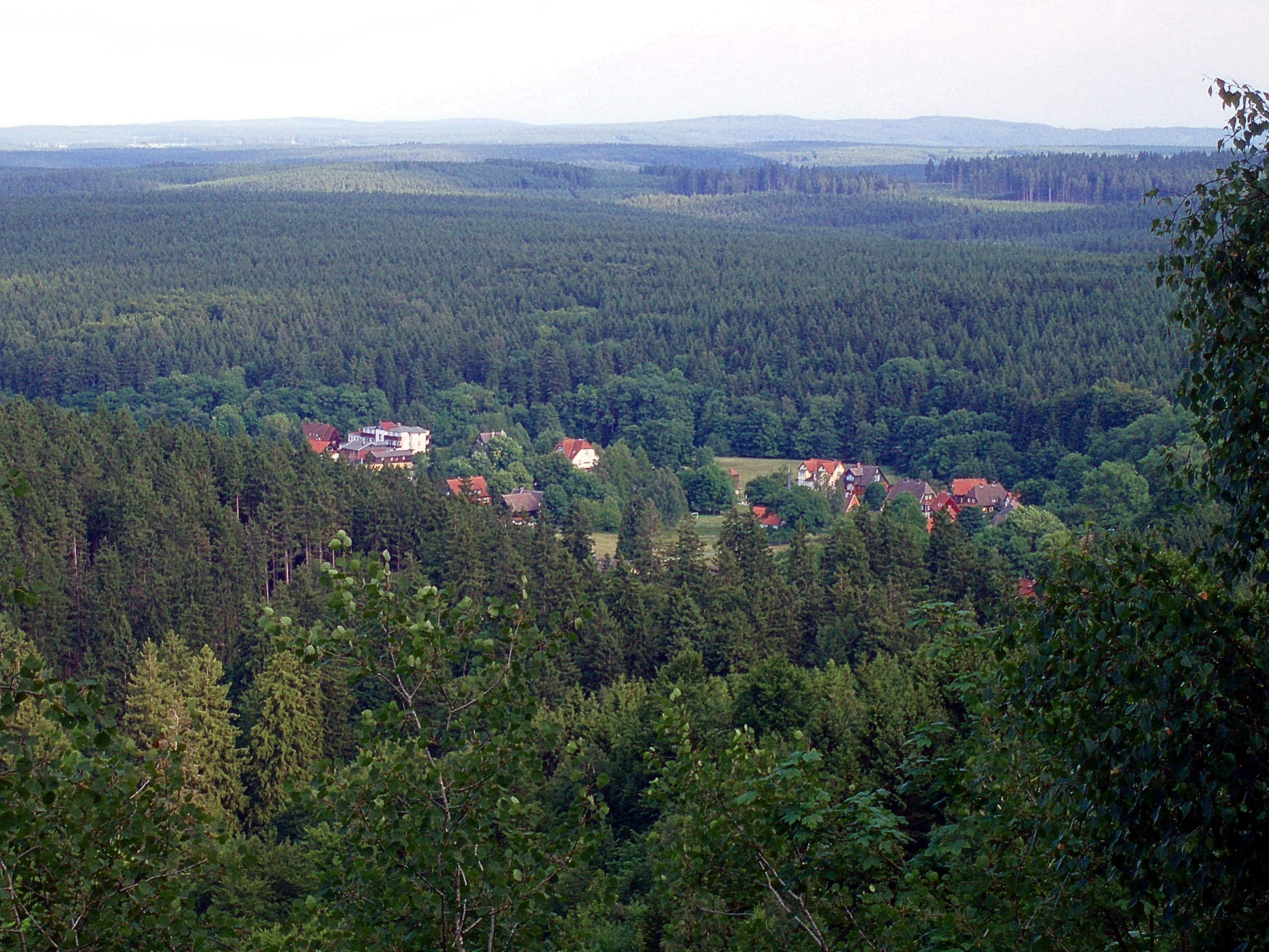 Blick auf den Ort Elend, Gemeinde Oberharz am Brocken (zum Aufnahmezeitpunkt noch Gemeinde Elend); Umgebung im Landschaftsschutzgebiet „Harz und Vorländer“ (LSG 32)